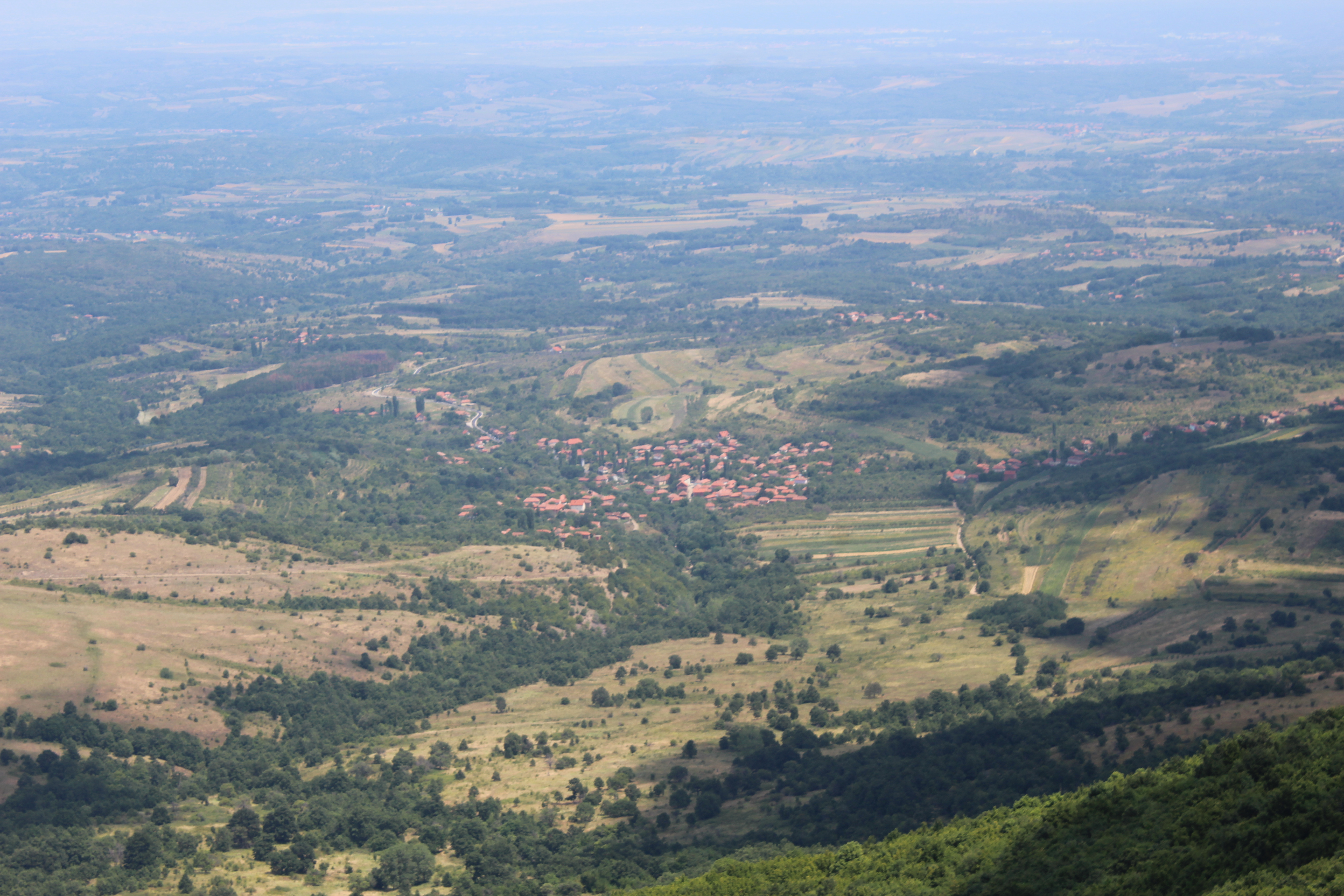 Srpski (latinica): Selo Slišane viđeno sa vidikovca Kamena, na Petrovoj gori.